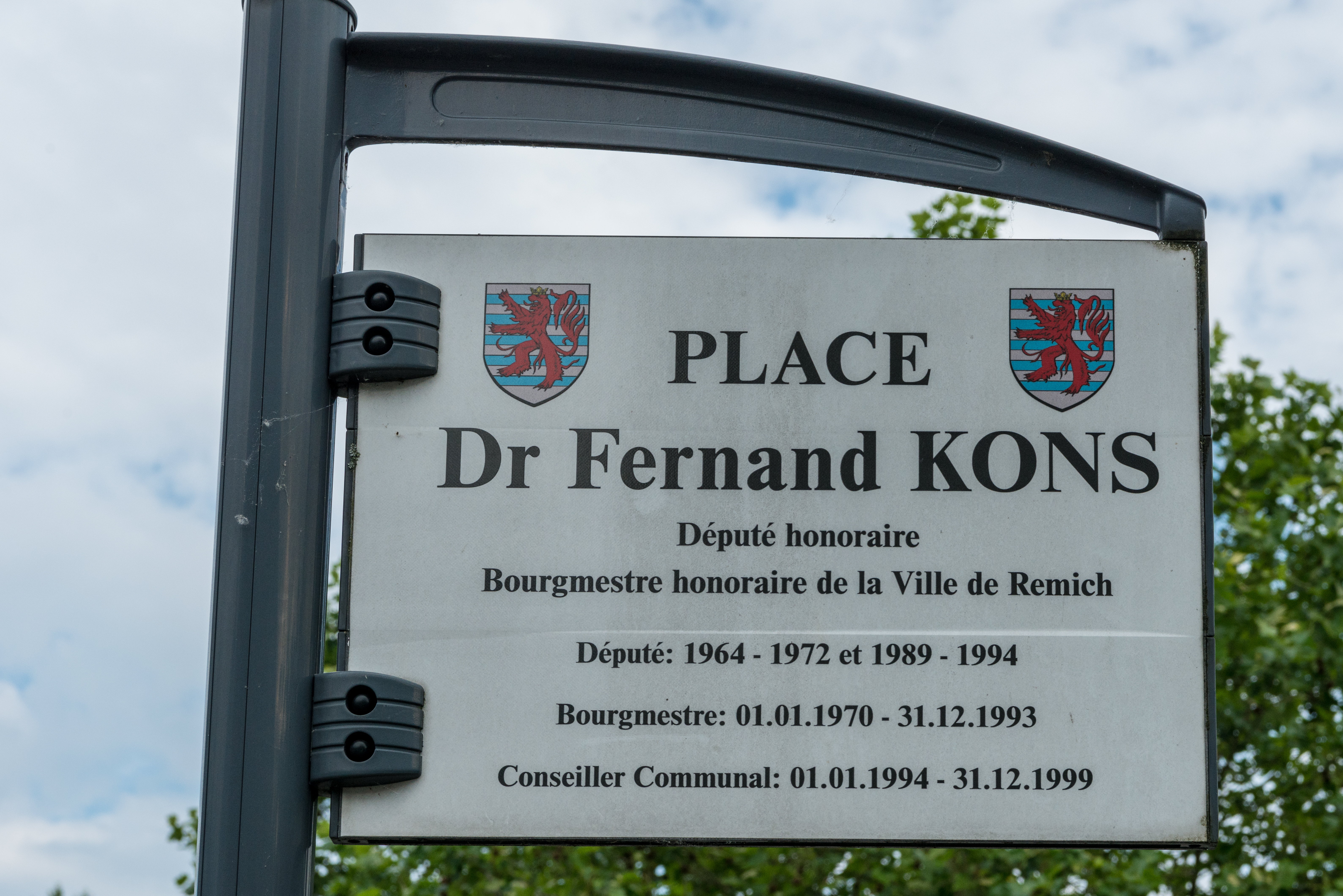 Schëld op der Place Dr Fernand-Kons zu Réimech.